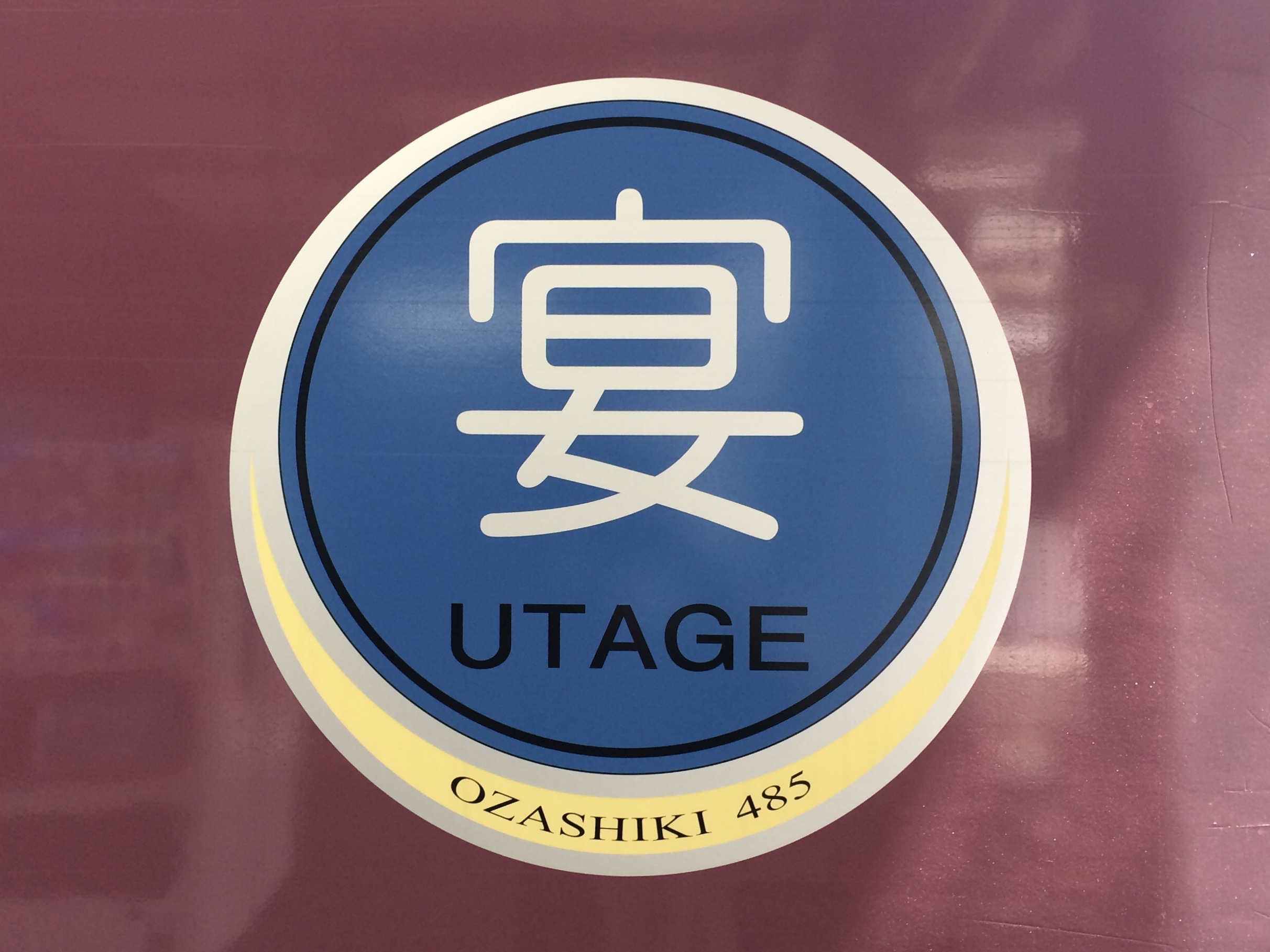 485系宴 ロゴマーク